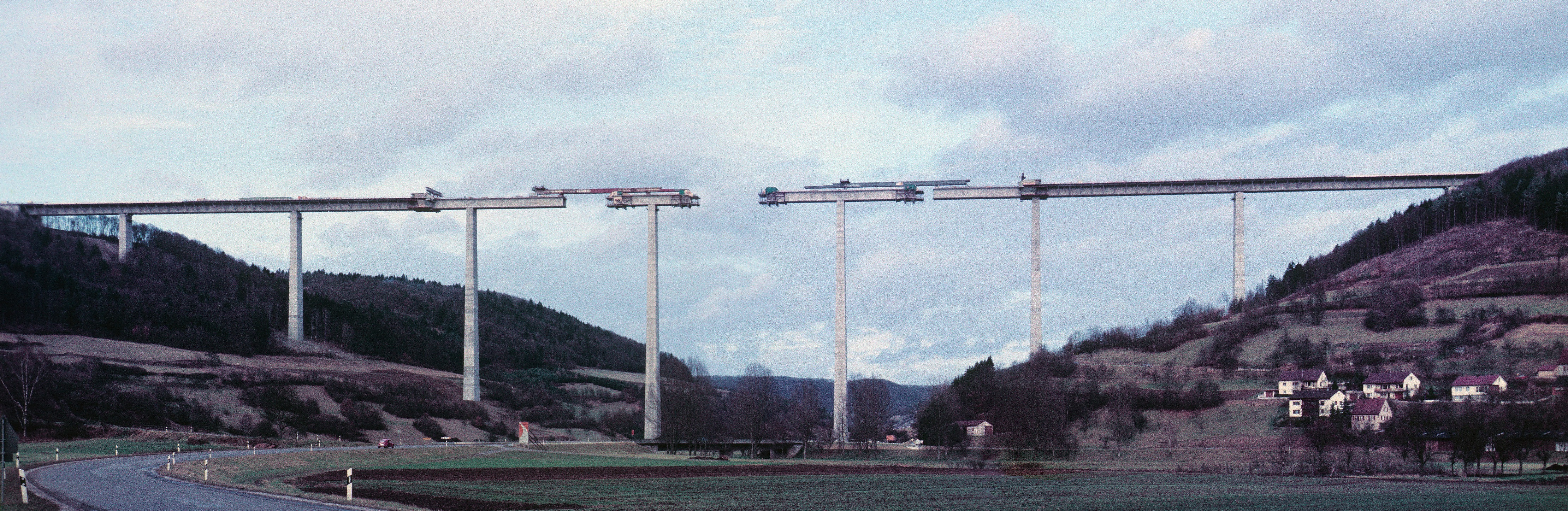 Kochertalbrücke im Bau. Mit Hugin und Enblend aus zwei Dias zusammengesetztes Bild.